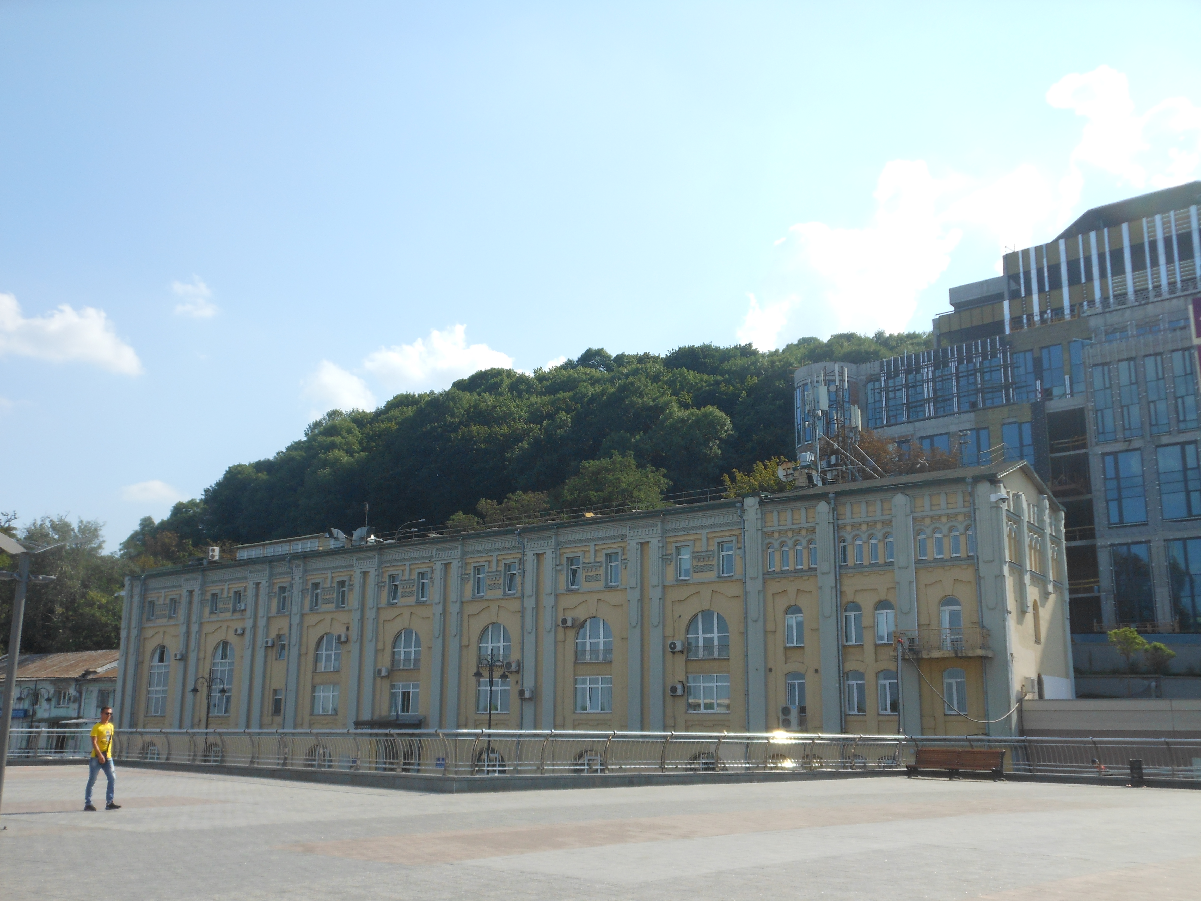 Станція центральна електрична Київської міської залізниці, Київ, Набережне шосе, 2